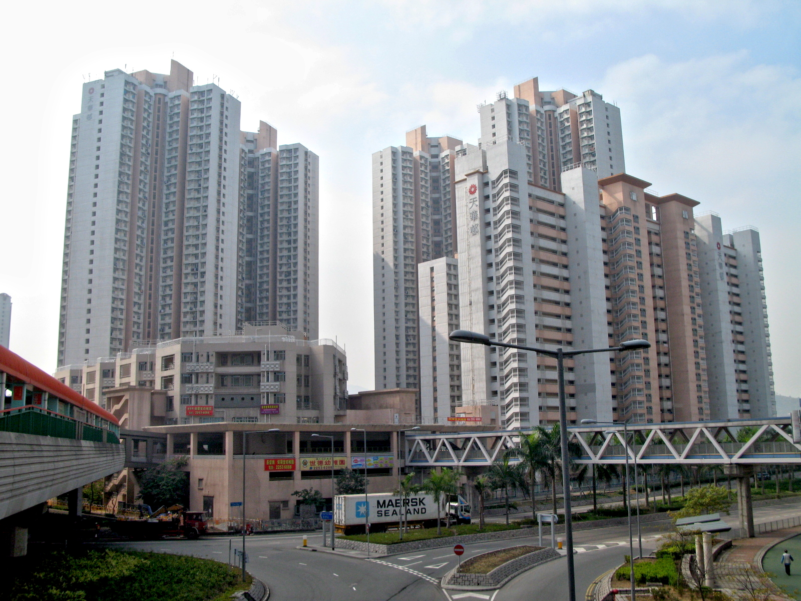 Tin Wah Estate in Tin Shui Wai 天華邨